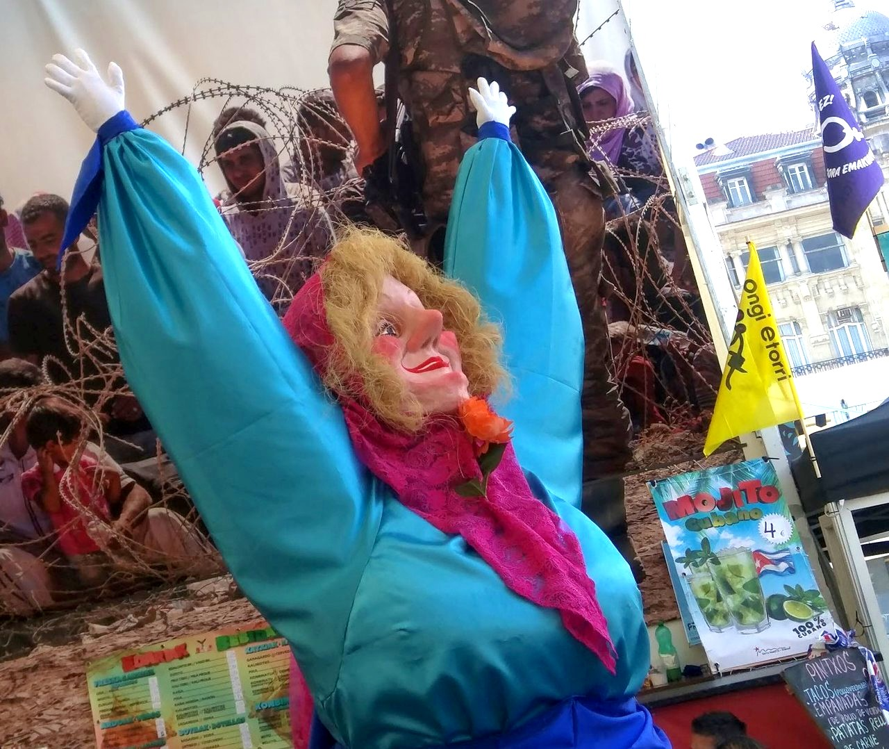 Mari Puri Herrero artistak 1978ko abuztuan sortutakoa da